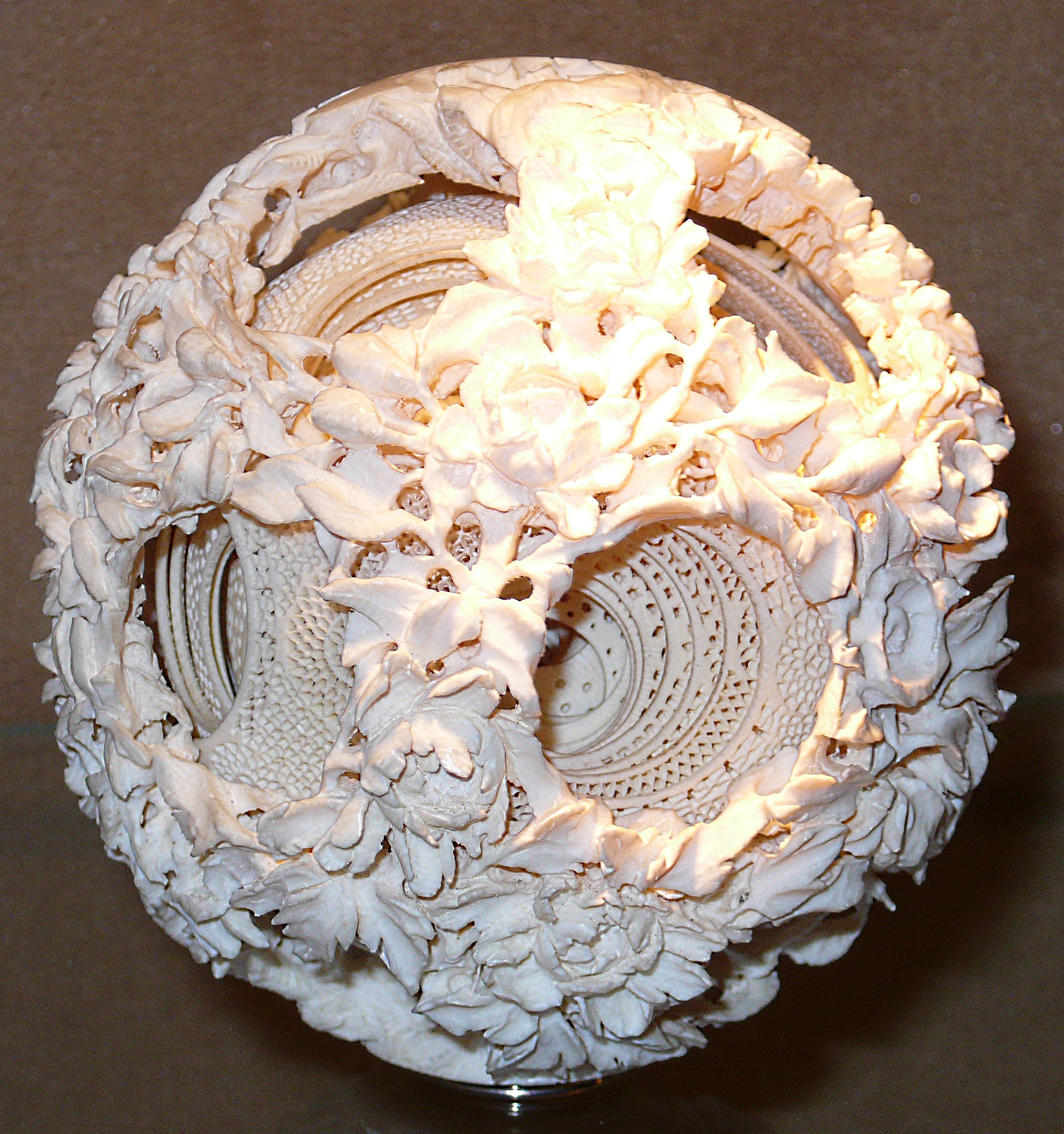 Sphärenkugel im Felsenmuseum in Bernstein im Burgenland von Otto Potsch